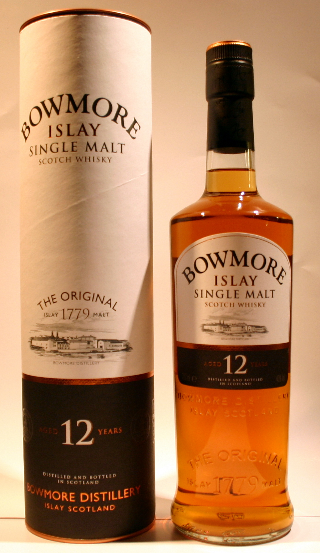 Bowmore Single Malt Scotch Whisky 12 years old